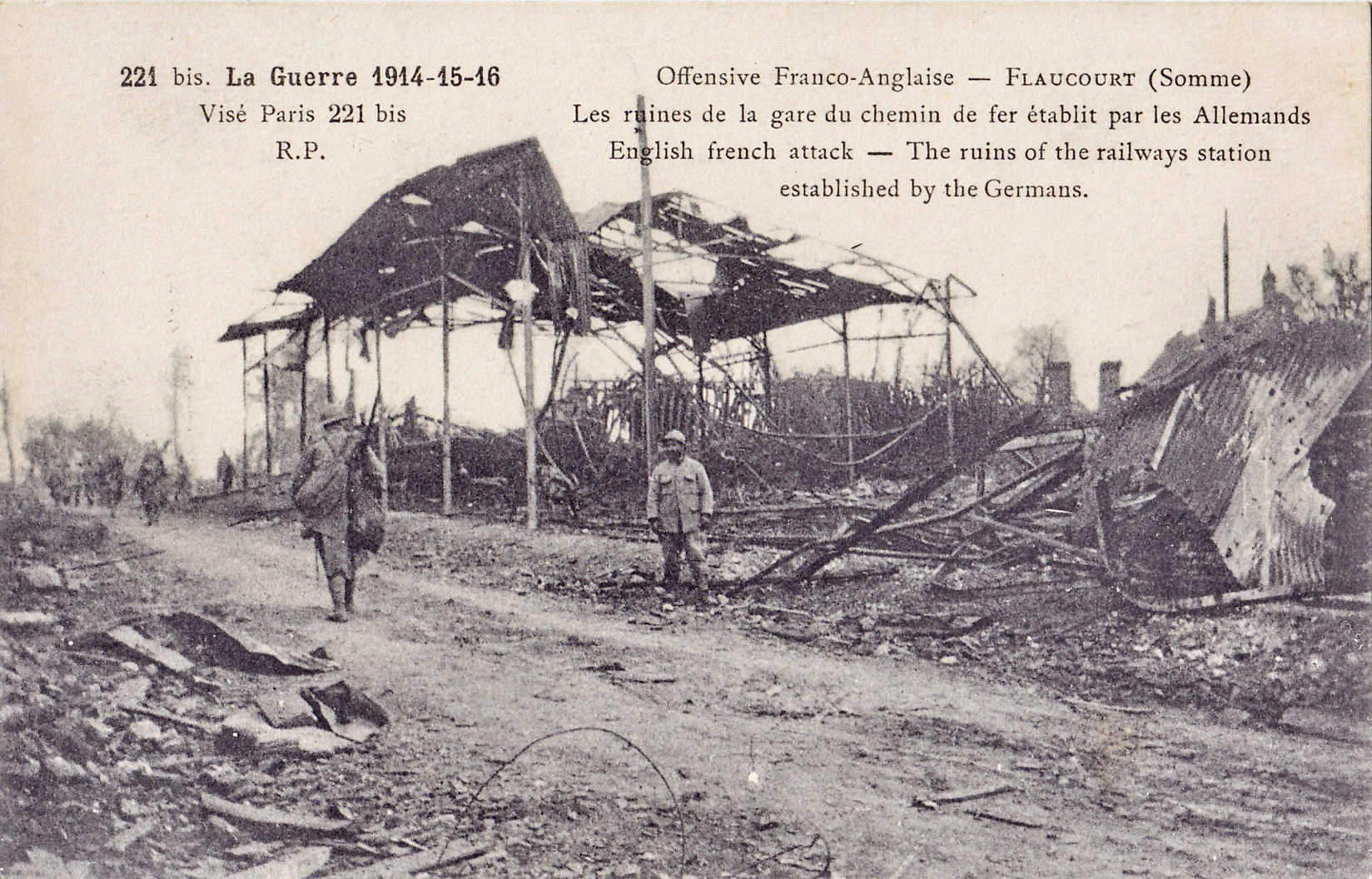 Carte postale ancienne éditée par RP n° 221 bis, collection La Guerre de 1914-15-16 :Offensive franco-anglaise - FLAUCOURT - Les ruines de la gare du chemin de fer établi par les Allemands